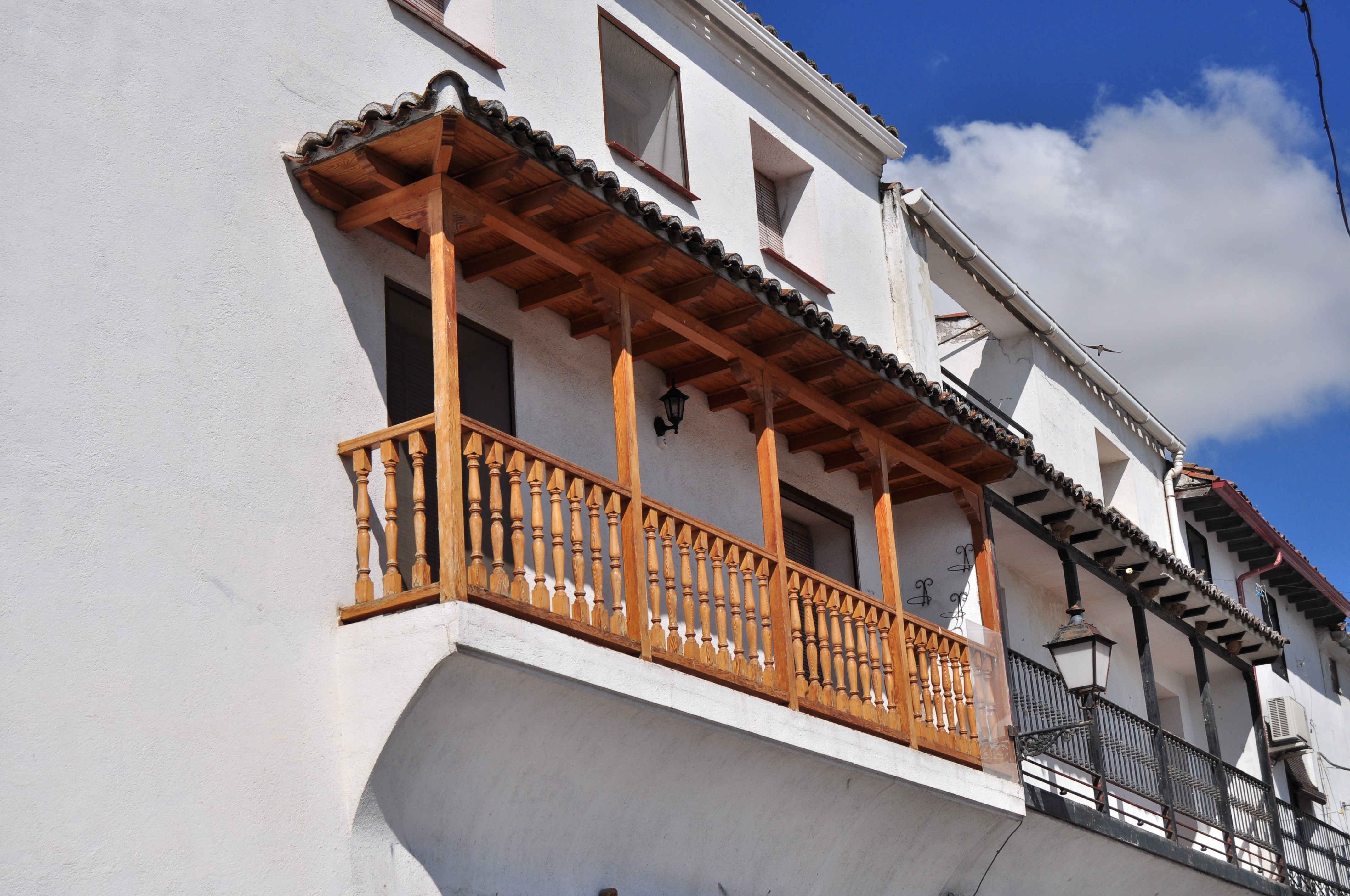 Carabaña - 009